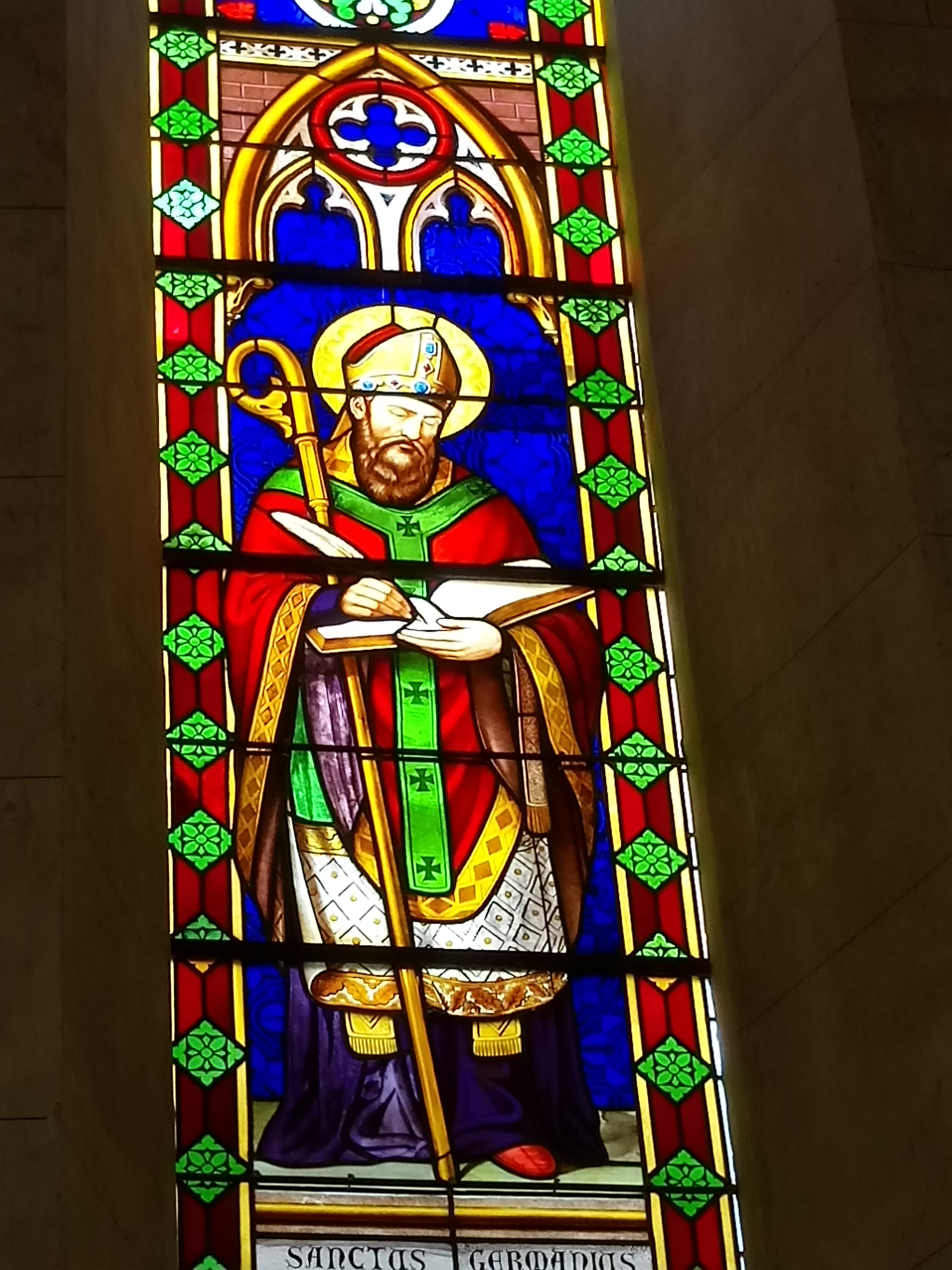 Ce vitrail de St germain est magnifique, très détérioré il a été restauré en 2019.